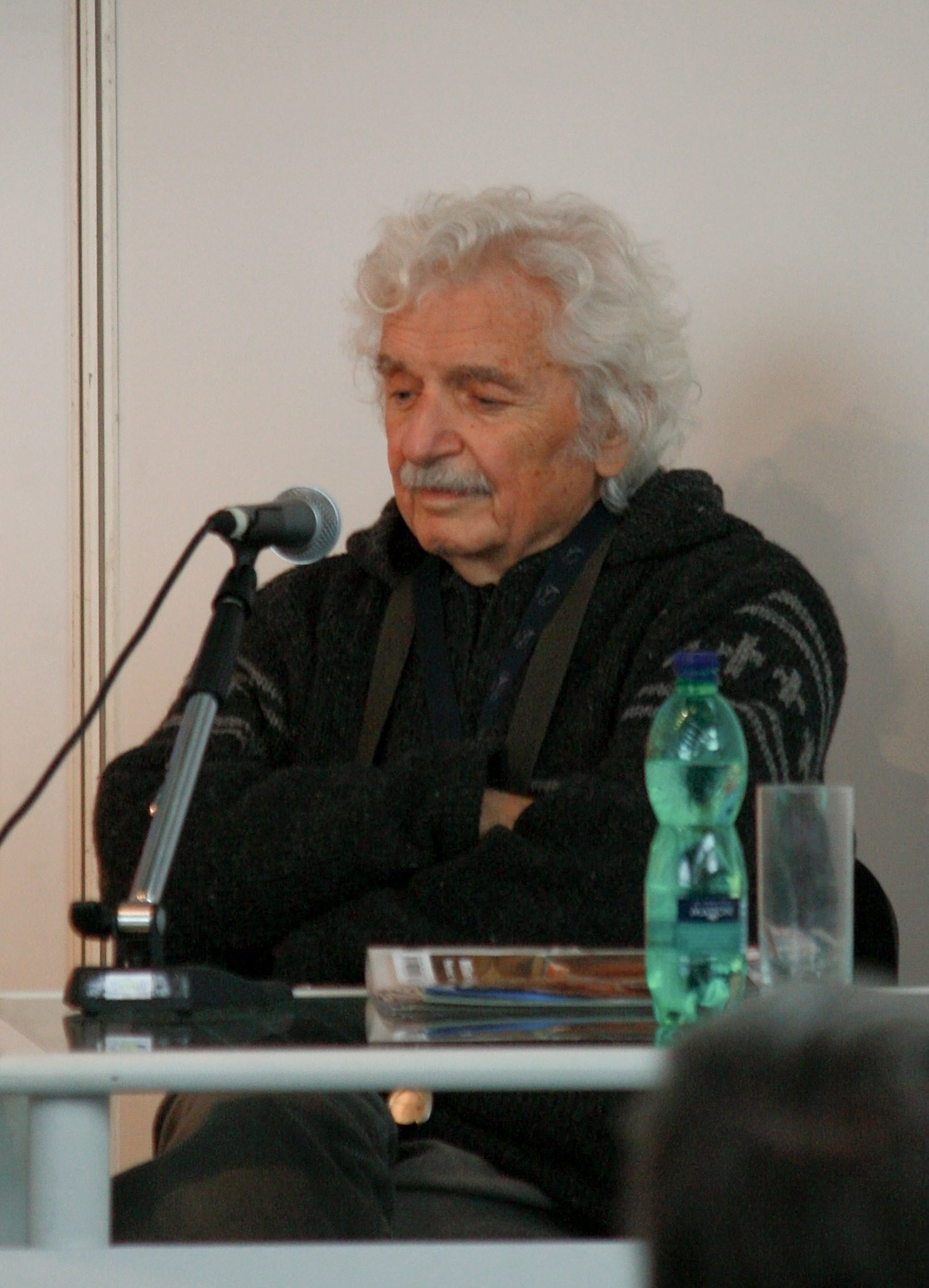 Ladislav Smoljak (1931-2010) na Světu knihy 2010 v Praze.